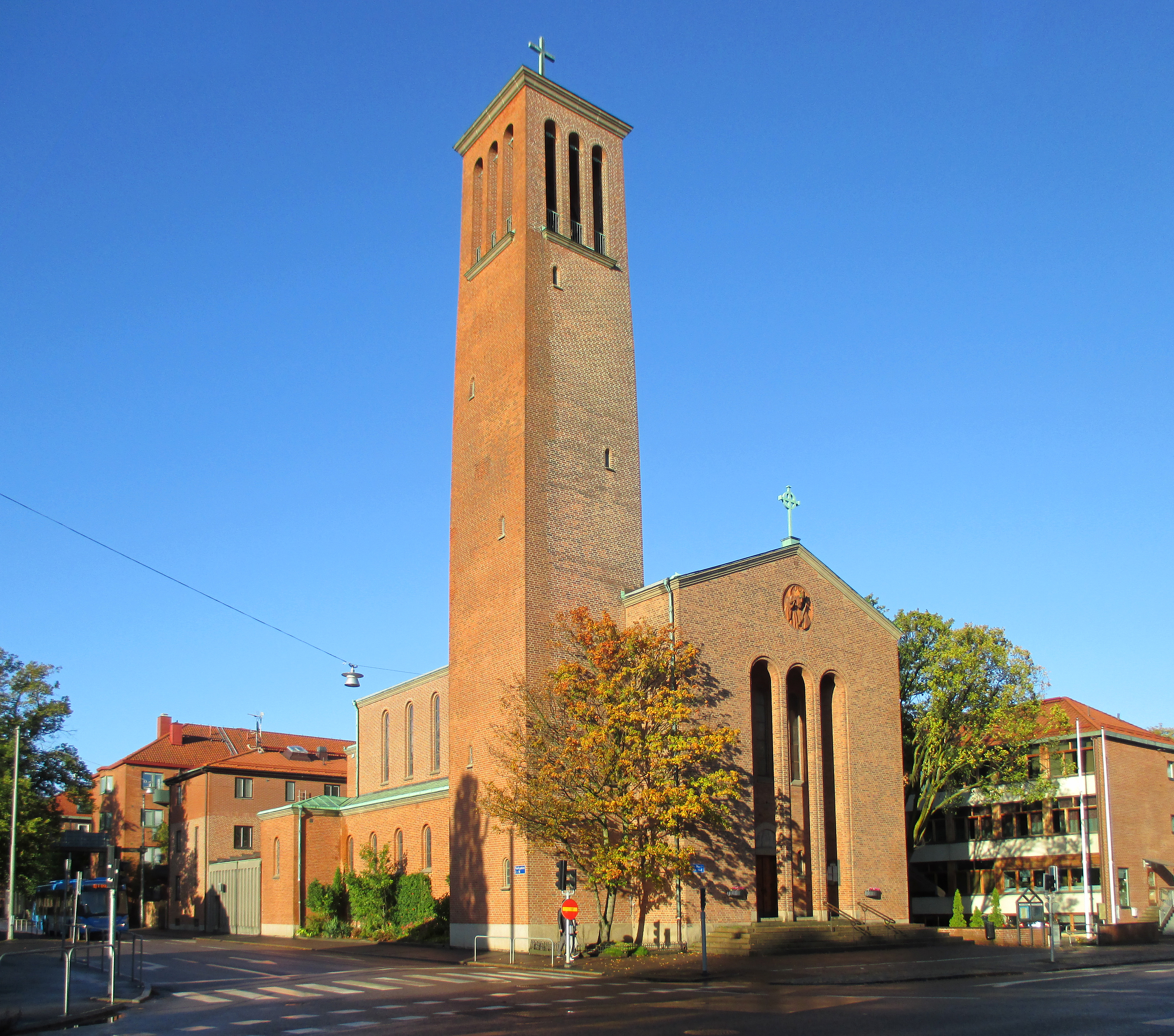 Kristus Konungens katolska kyrka på Parkgatan 16 i Göteborg, Göteborgs kommun, Västergötland, Västra Götalands län, Sverige. I folkmun kallas kyrkan för "Hedendomen" då den ligger vid Heden.